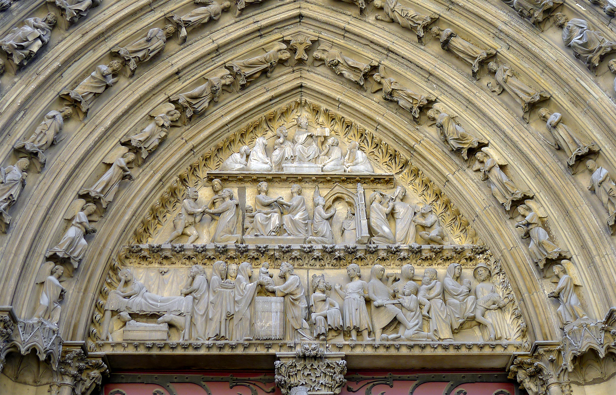 Notre-Dame de Paris, façade nord (tympan du portail du cloître) - Paris IV